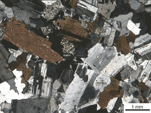 tonalite. nicol incrociati